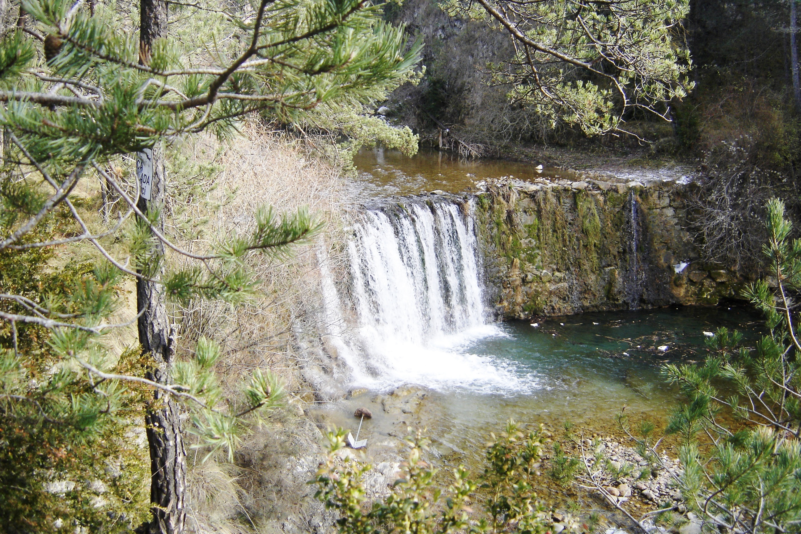 L'Aigua d'hora just després de rebre per l'esquerra les aigües del Riu del Coll de Jouet, a Guixers (Solsonès).